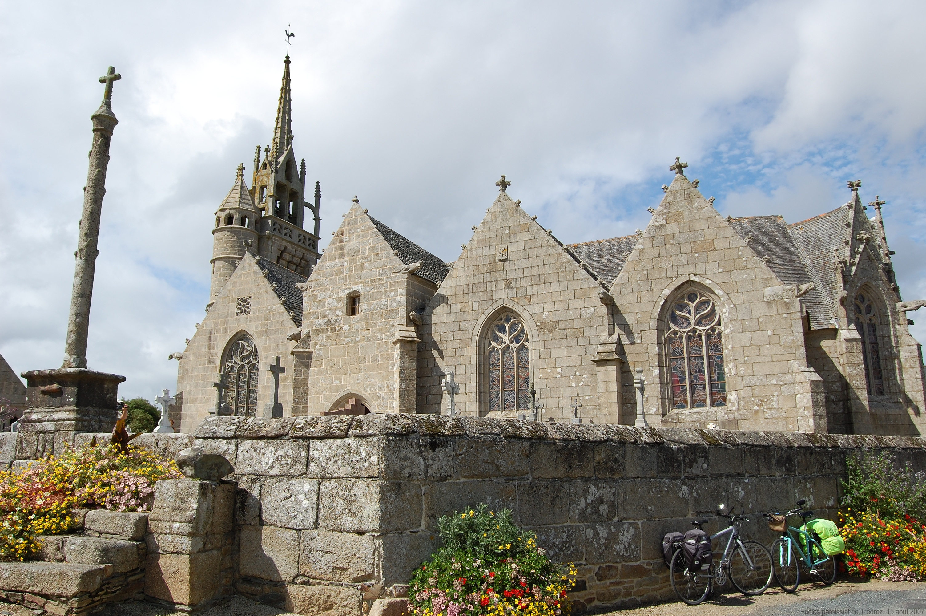 Enclos paroissial de Trédrez, France.